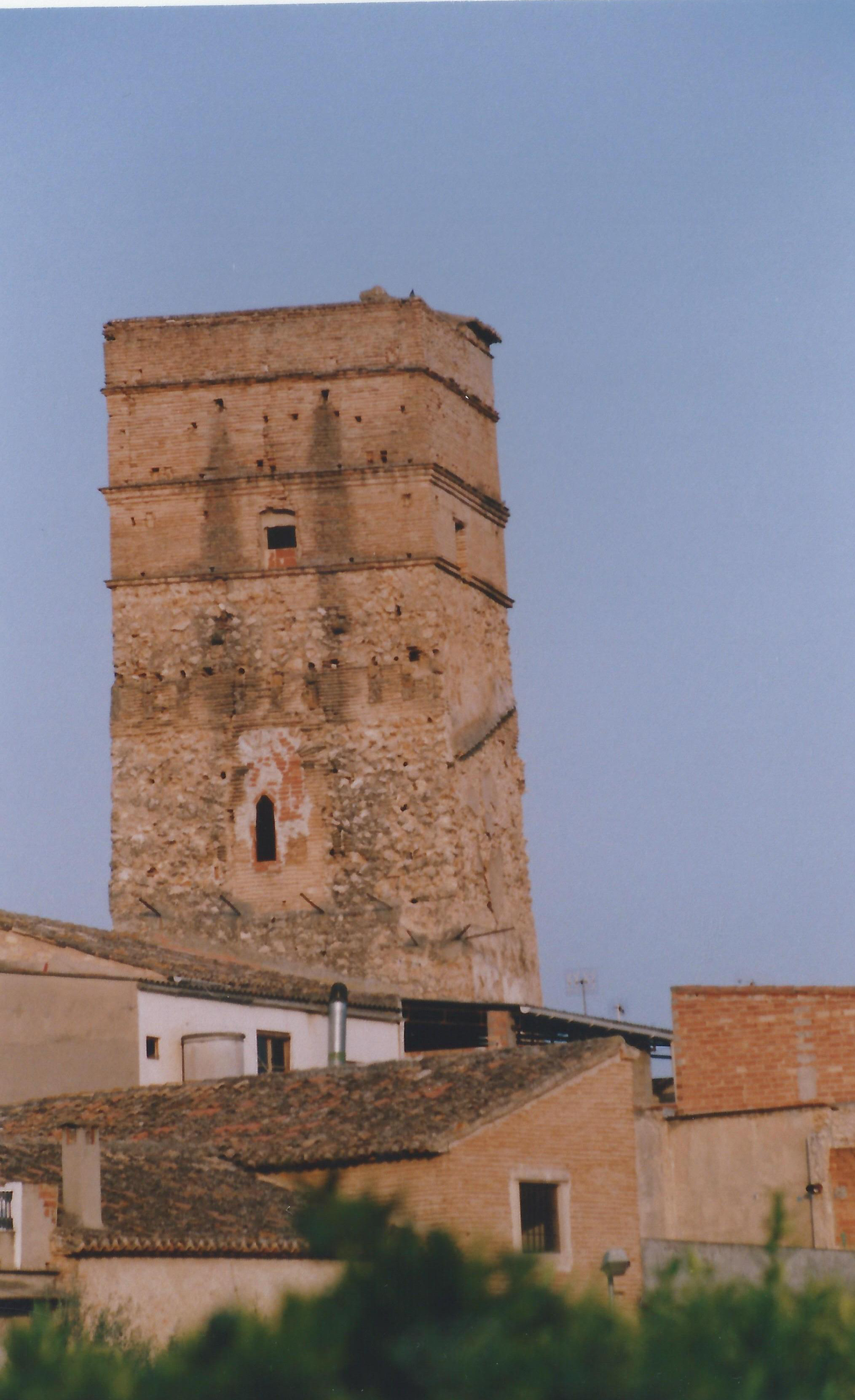 Torre d'origen àrab a Antella